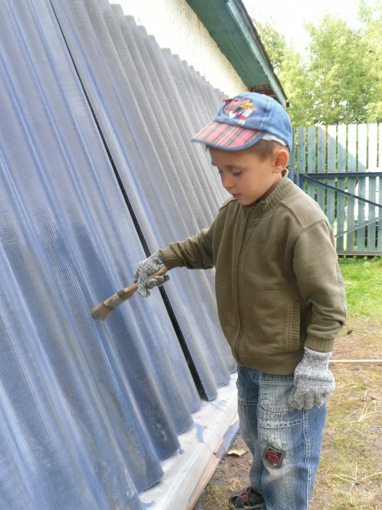 Labour